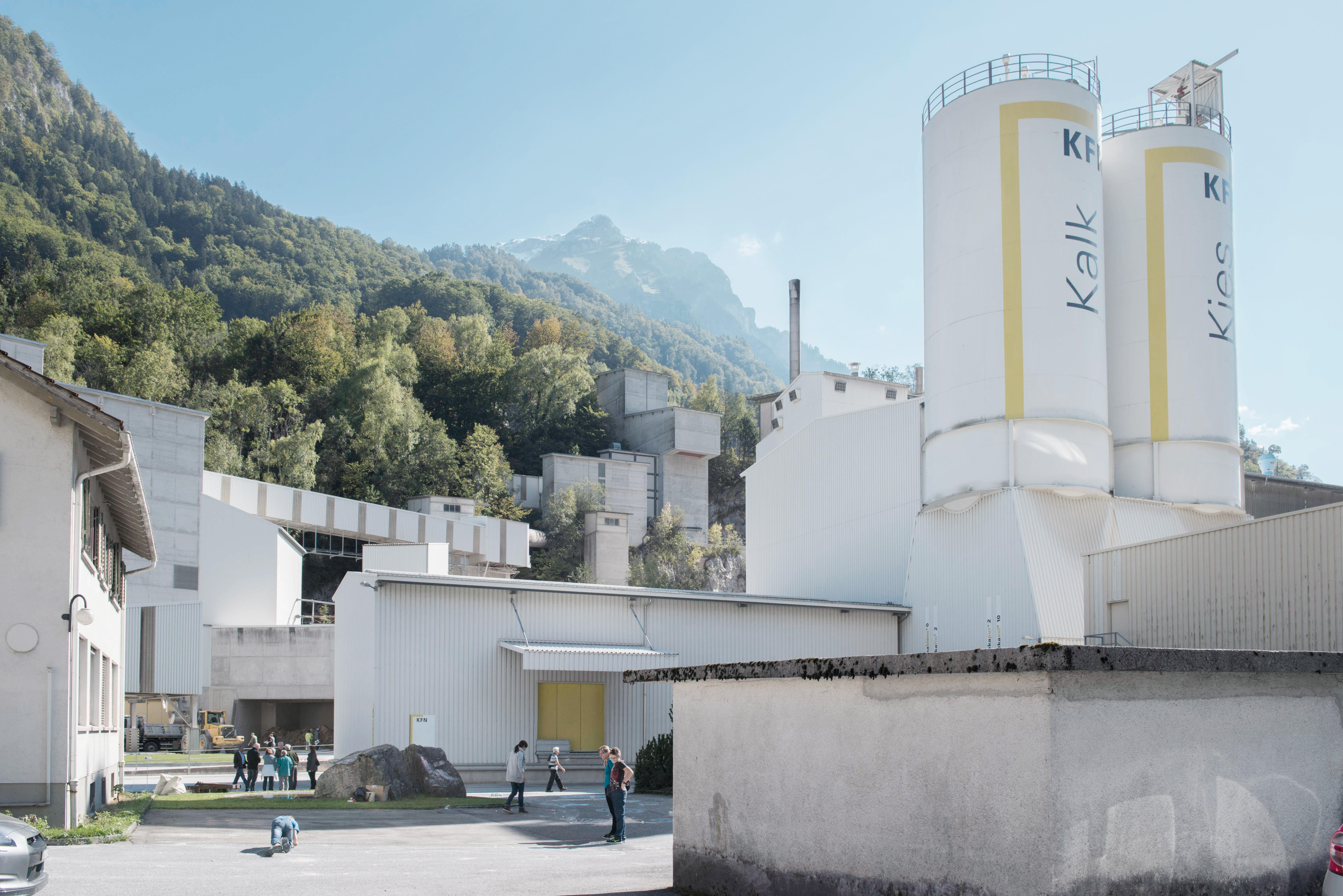 Kalkfabrik Netstal, Firmengebäude, Silo, Kalk, Kies